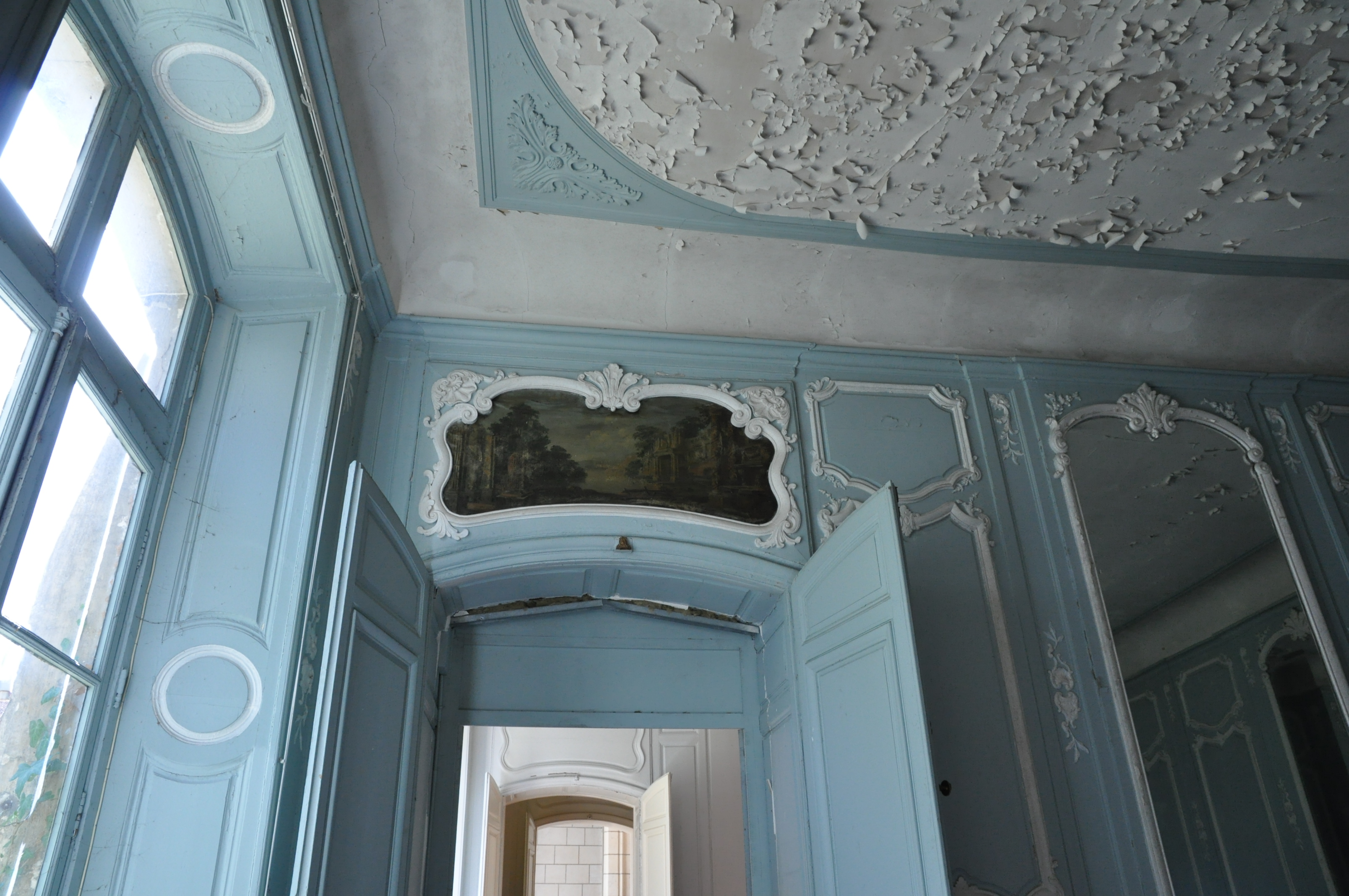 Hôtel de Panette, plafond de la salle à manger en 2011